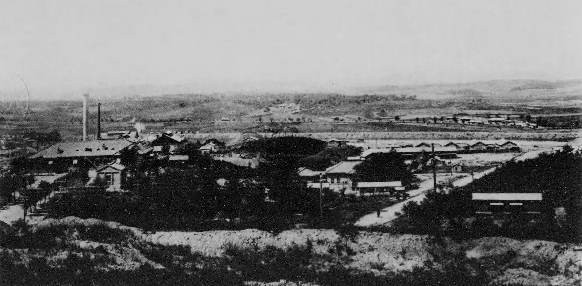 平壌鉱業所 平安南道 (日本統治時代) 朝鮮写真帖 (朝鮮総督府, 1921)